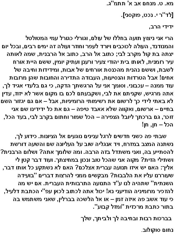 מכתב מנחום סוקולוב לרב יעקב נאכט חותנו של יצחק אבינרי